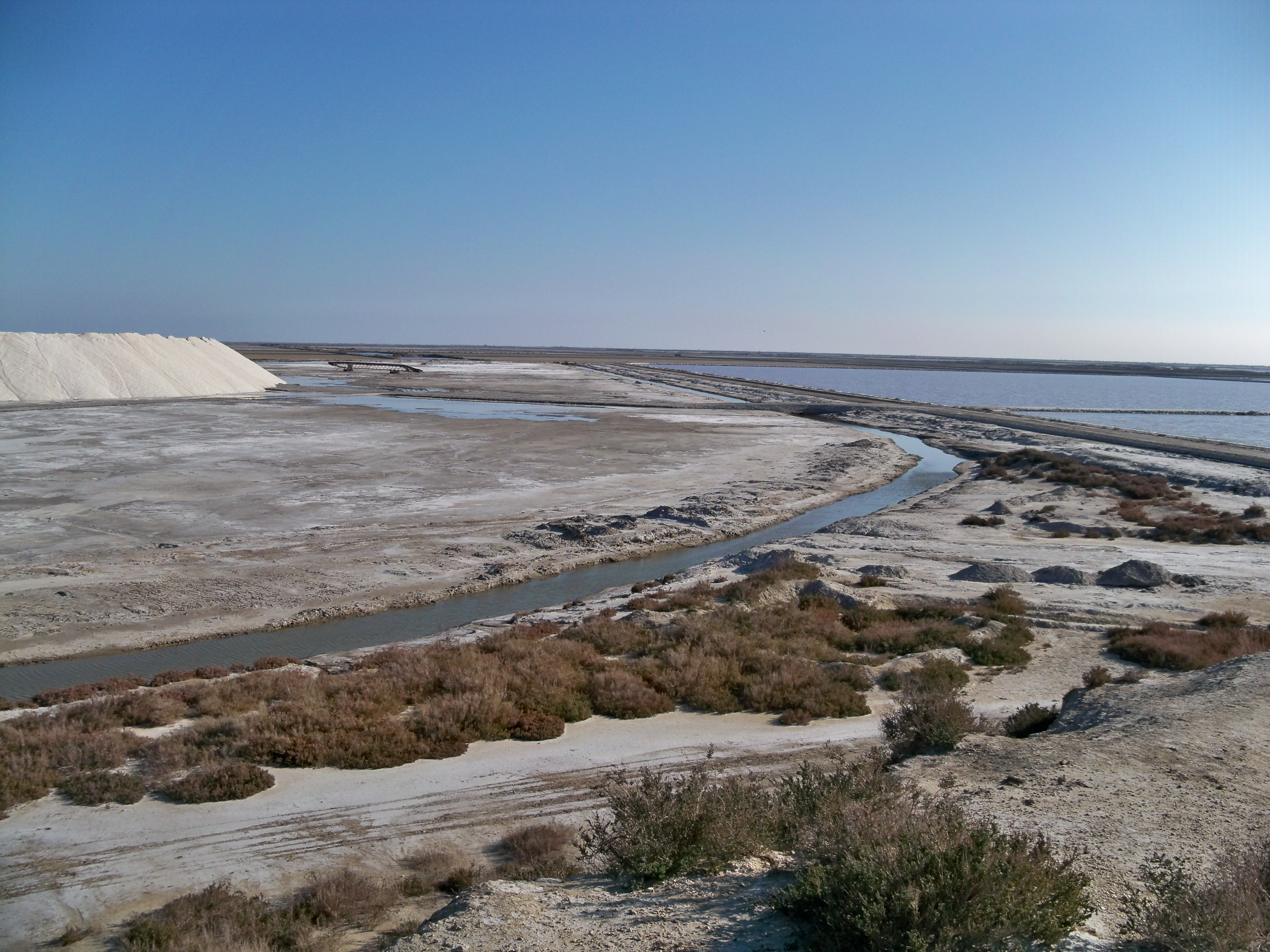 Salins du Midi au Salin-de-Giraud (13)